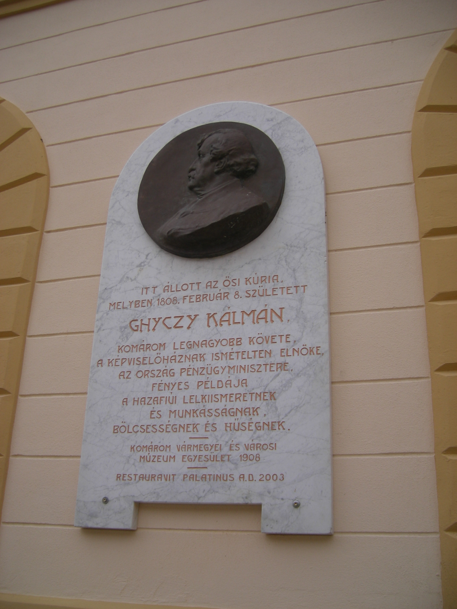 Komárom - Ghyczy Kálmán emléktáblája a Nádor utcában